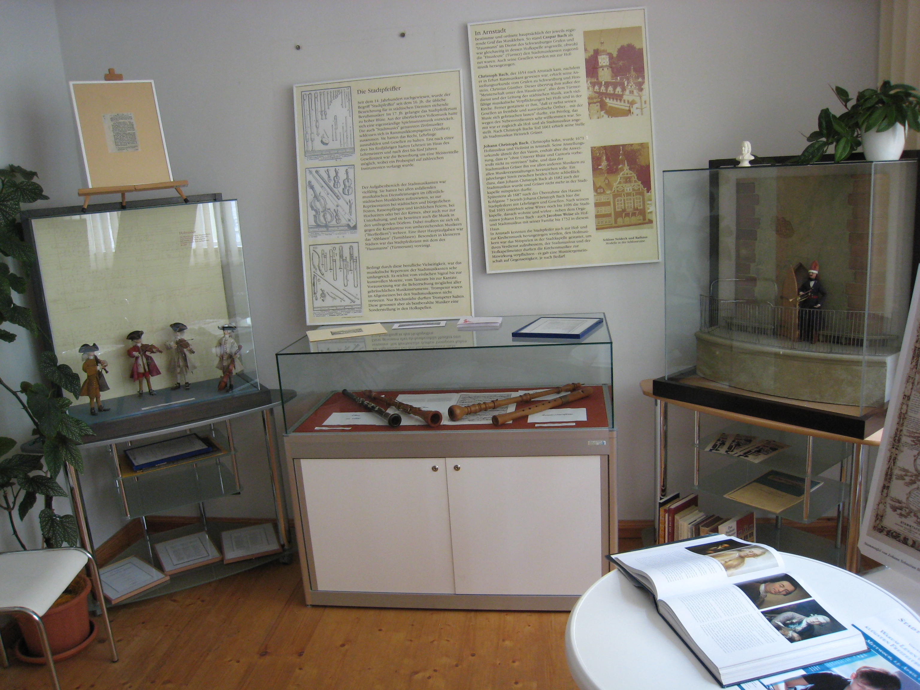 Das Bachhaus in Arnstadt (Kohlgasse 7).